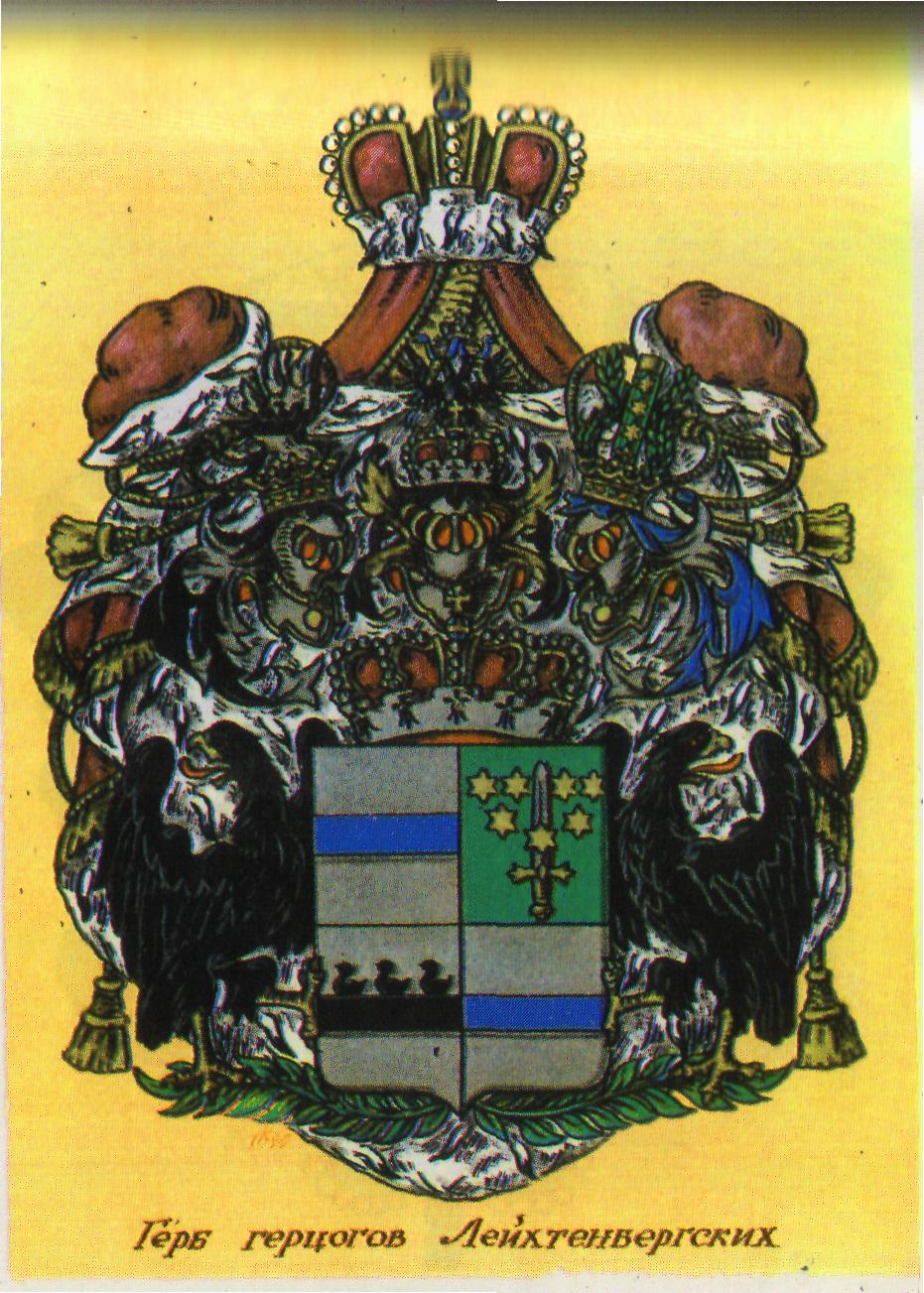 Герб герцогов Лейхтенбергских